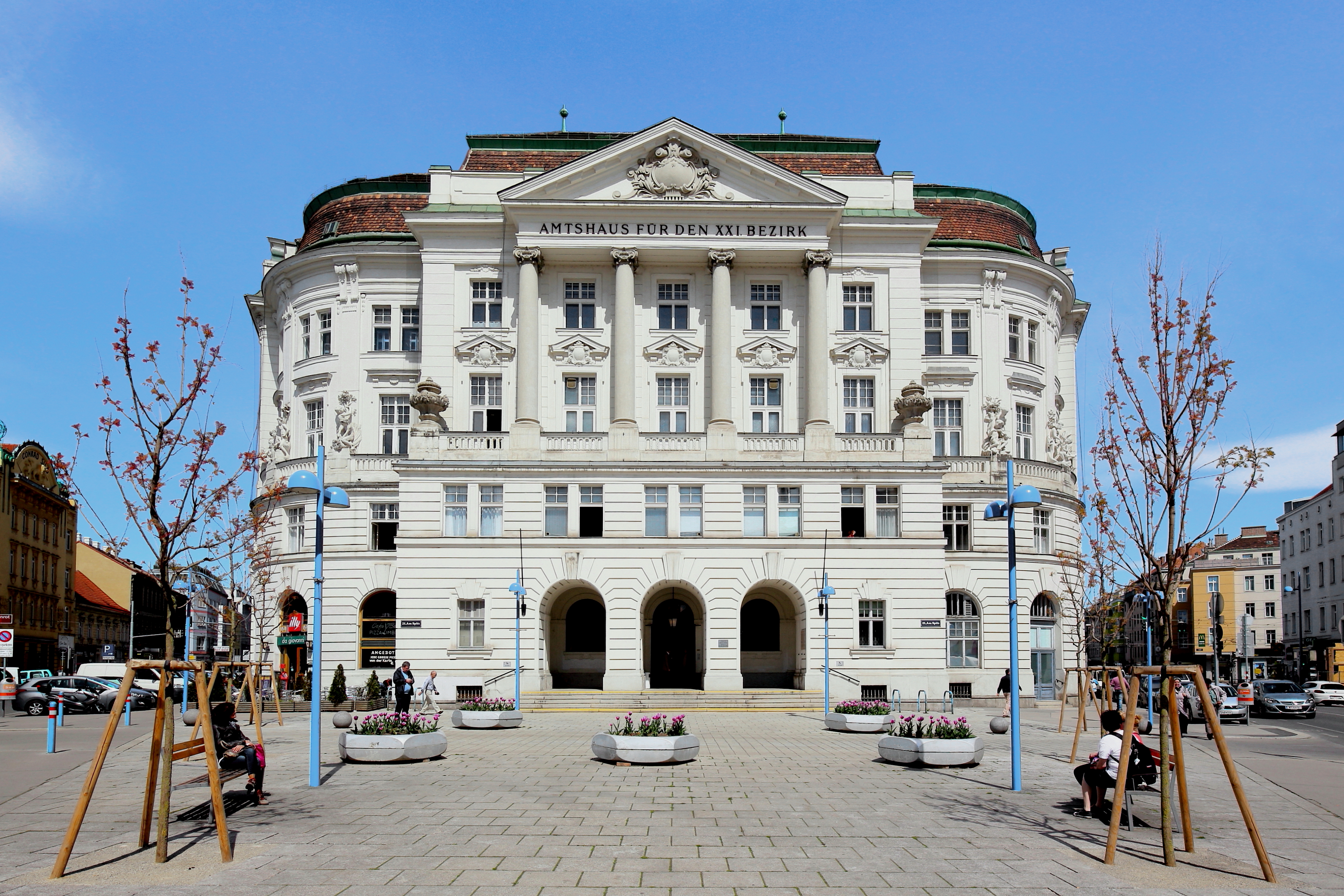 Das Amtshaus für den 21. Bezirk Floridsdorf in der österreichischen Bundeshauptstadt Wien. Das Gebäude in barockklassizistischen Formen wurde von 1901 bis 1903 – noch als Rathaus der Gemeinde Floridsdorf – nach Plänen von Anton und Josef Drexler errichtet.